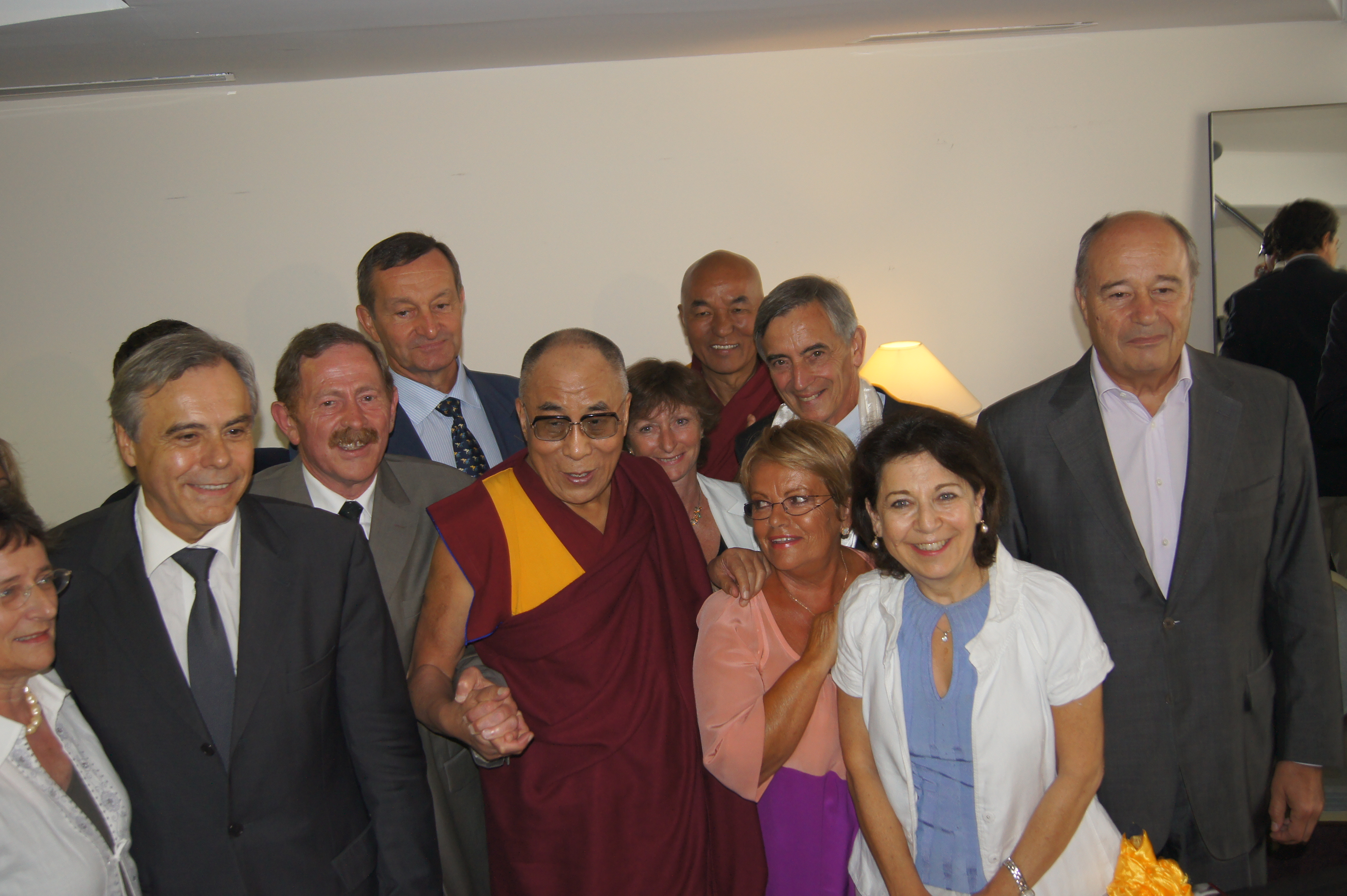 Rencontre des parlementaires avec sa sainteté le Dalaï Lama à Toulouse le 15 août 2011